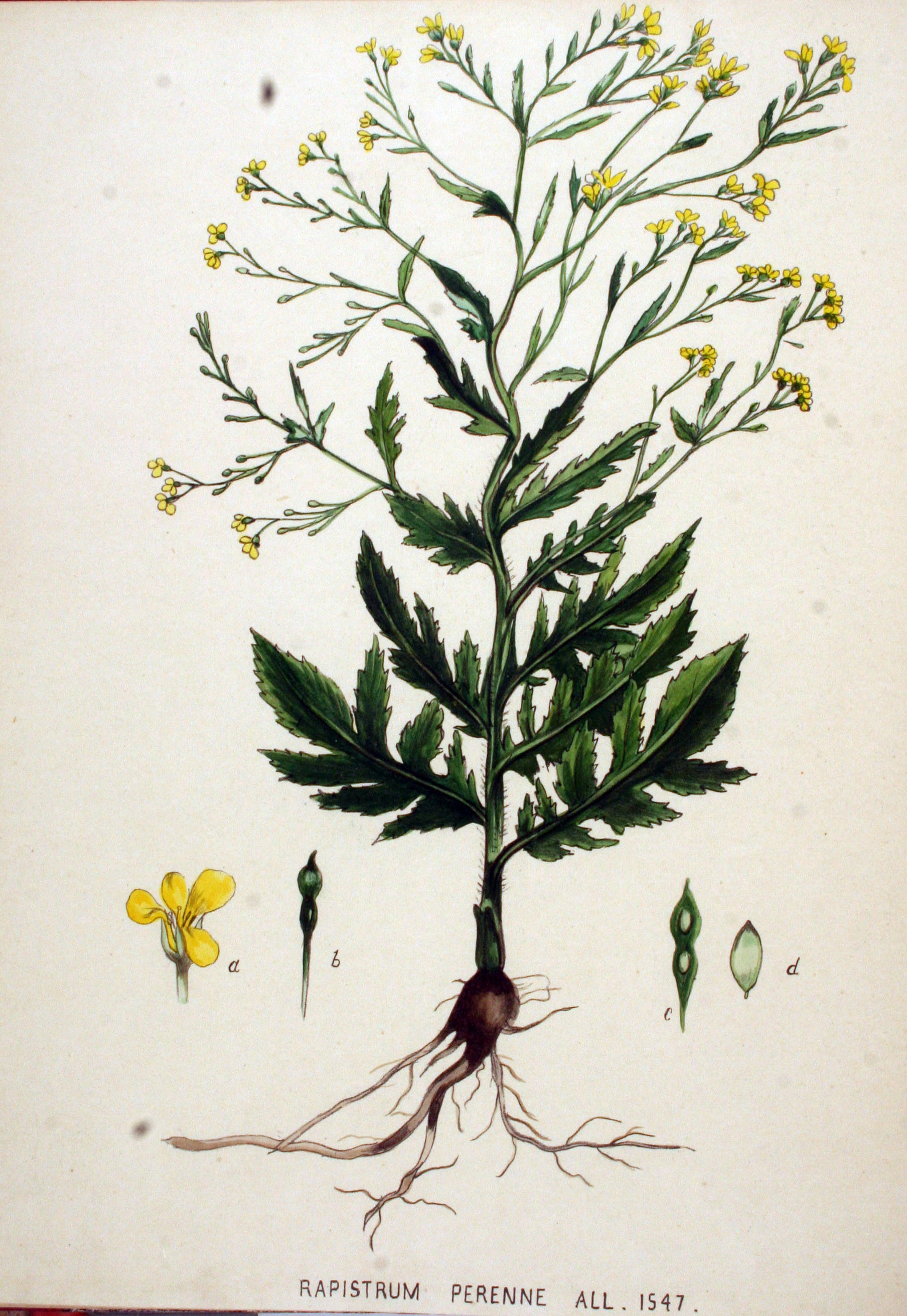 Rapistrum perenne (L.) All.